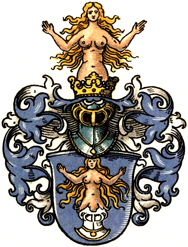 Wappen derer von Hiddessen